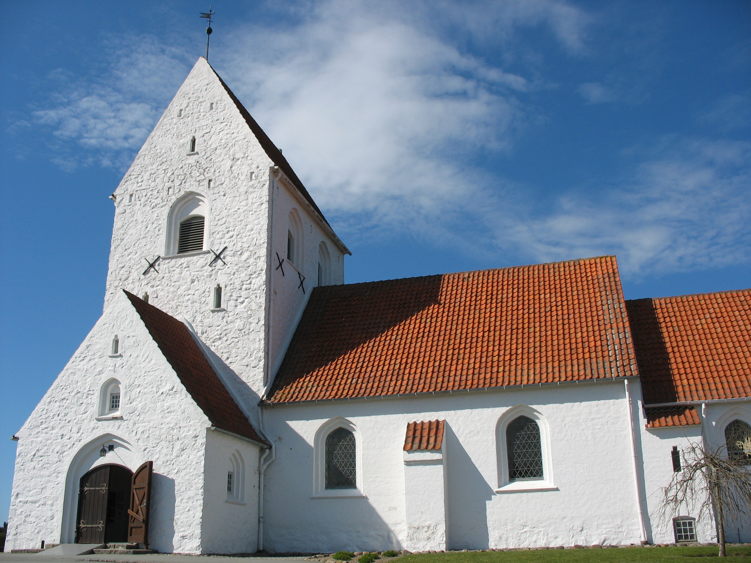 Bjerring Church, Viborg Kommune, Denmark. Kirken i Bjerring, Midtjylland. I sognet ligger også byen Bjerringbro.